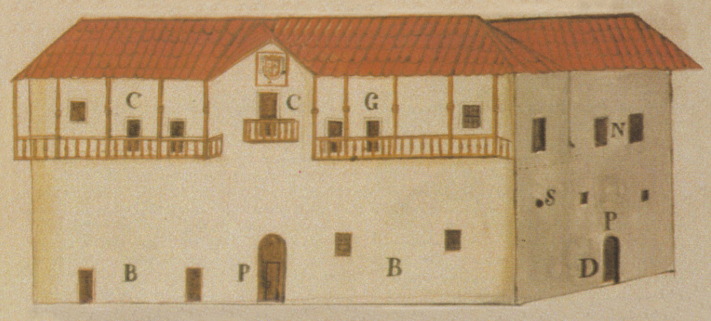 Proyecto de fachada del Cabildo de Santa Fe de Antioquia, 1797. Colombia.